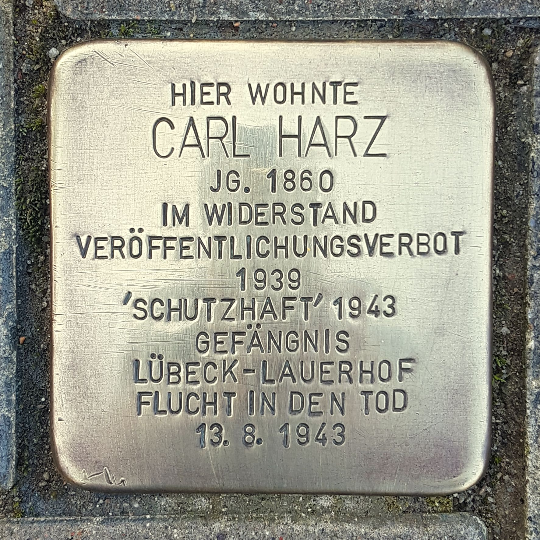 Stolperstein im Gedenken an Carl Harz, verlegt an dessen ehemaligem Wohnort an der Carl-Harz-Str. 6 in Reinfeld (Holstein). 2014 erstmals verlegt, 2017 durch Vandalismus stark beschädigt und im gleichen Jahr ersetzt. Fotografie aus November 2019.